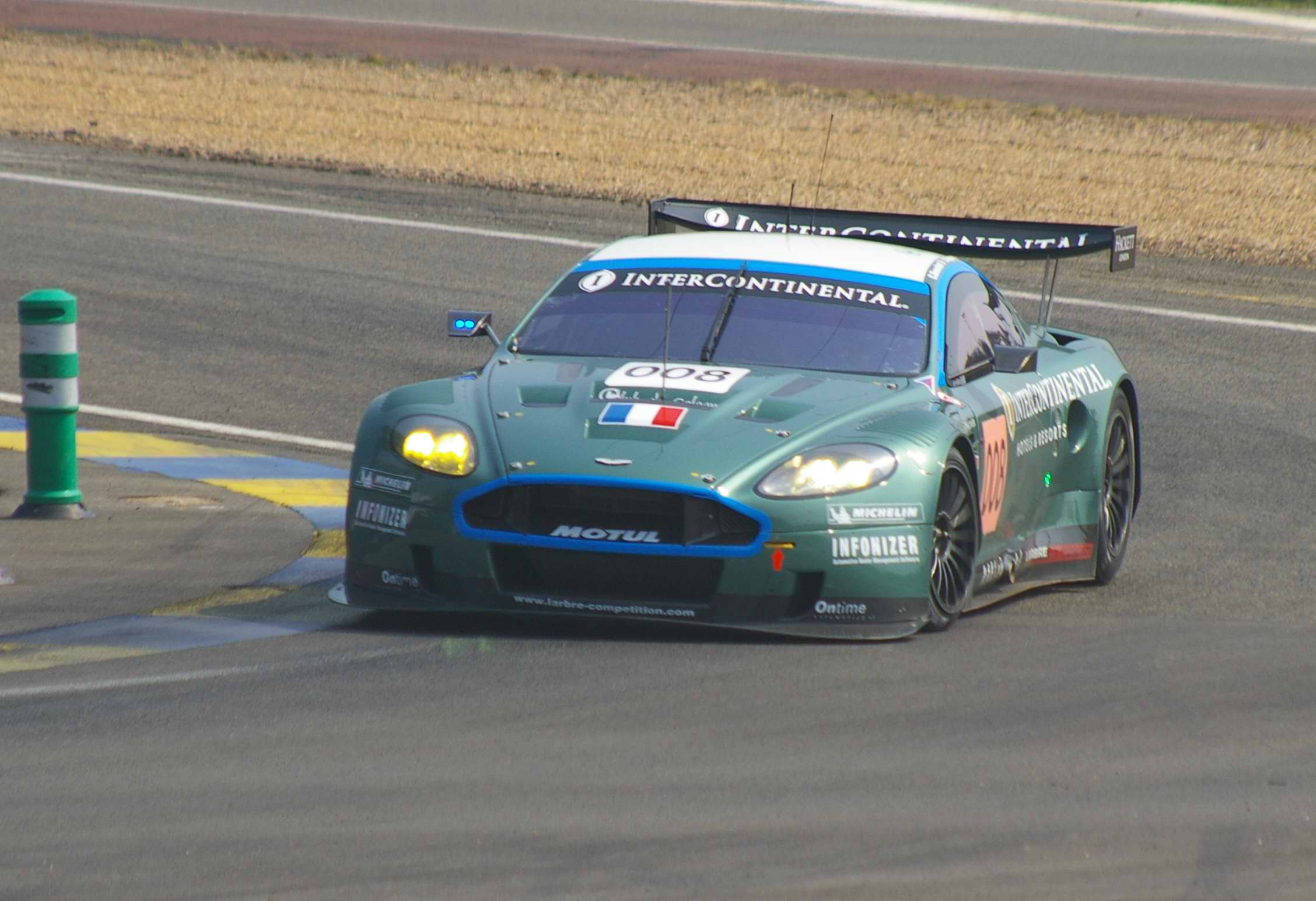 Virage de Mulsanne - Aston Martin DBR9 de l'équipage 008 (Christophe Bouchut, Fabrizio Gollin et Casper Elgaard) lors de la journée test des 24h du Mans du 03 juin 2007.